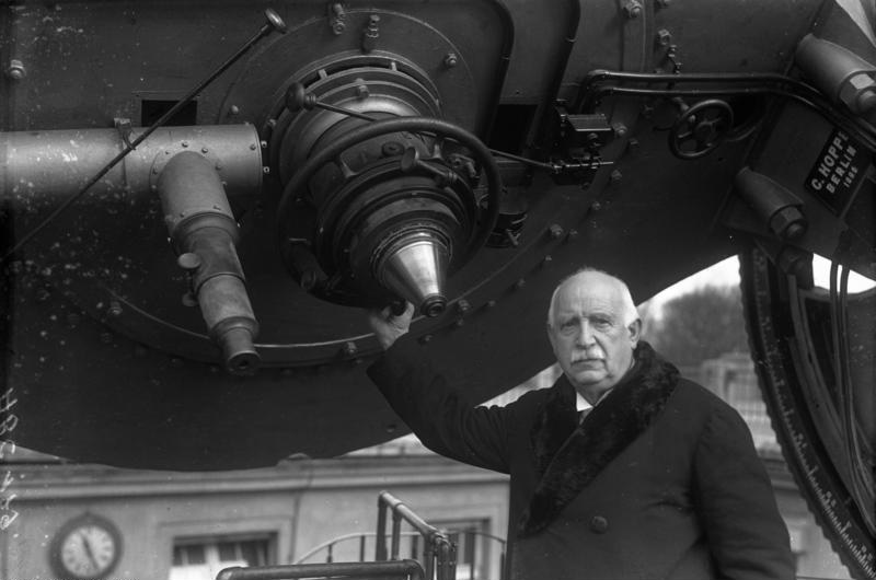 Der Leiter der Treptower Sternwarte Dr. Friedrich Archenhold wird 70 Jahre alt! Dr. Friedrich Archenhold, welcher am 2. Oktober seinen 70. Geburtstag feierte, am Okularende des Riesenfernrohres der Treptower Sternwarte.